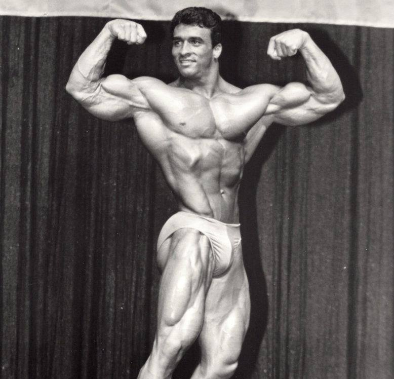 Rick Valente